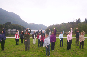 Conforme: este arquivo foi colocado em domínio público por seu criador.